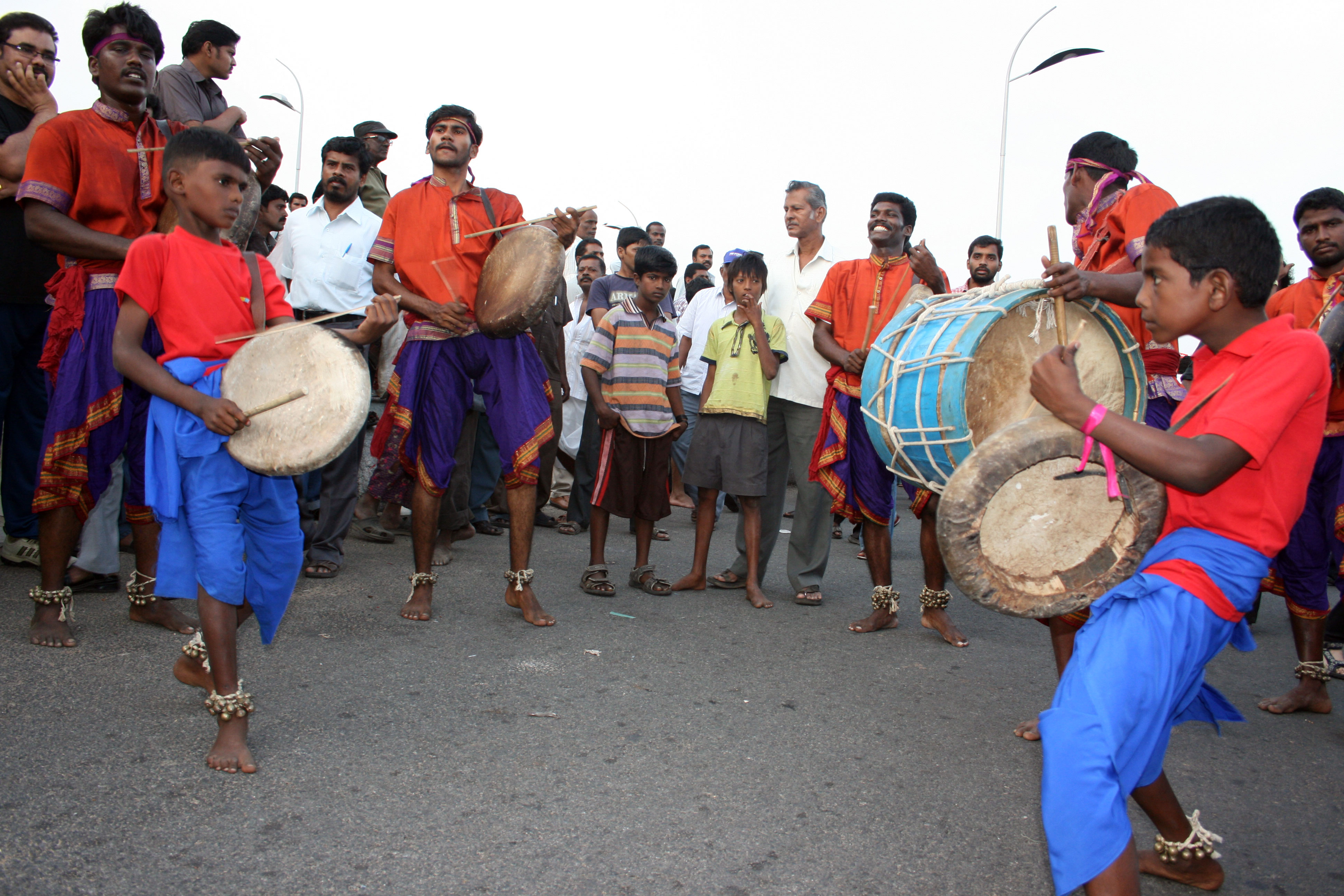 ஆதித்தமிழன் நடனம்